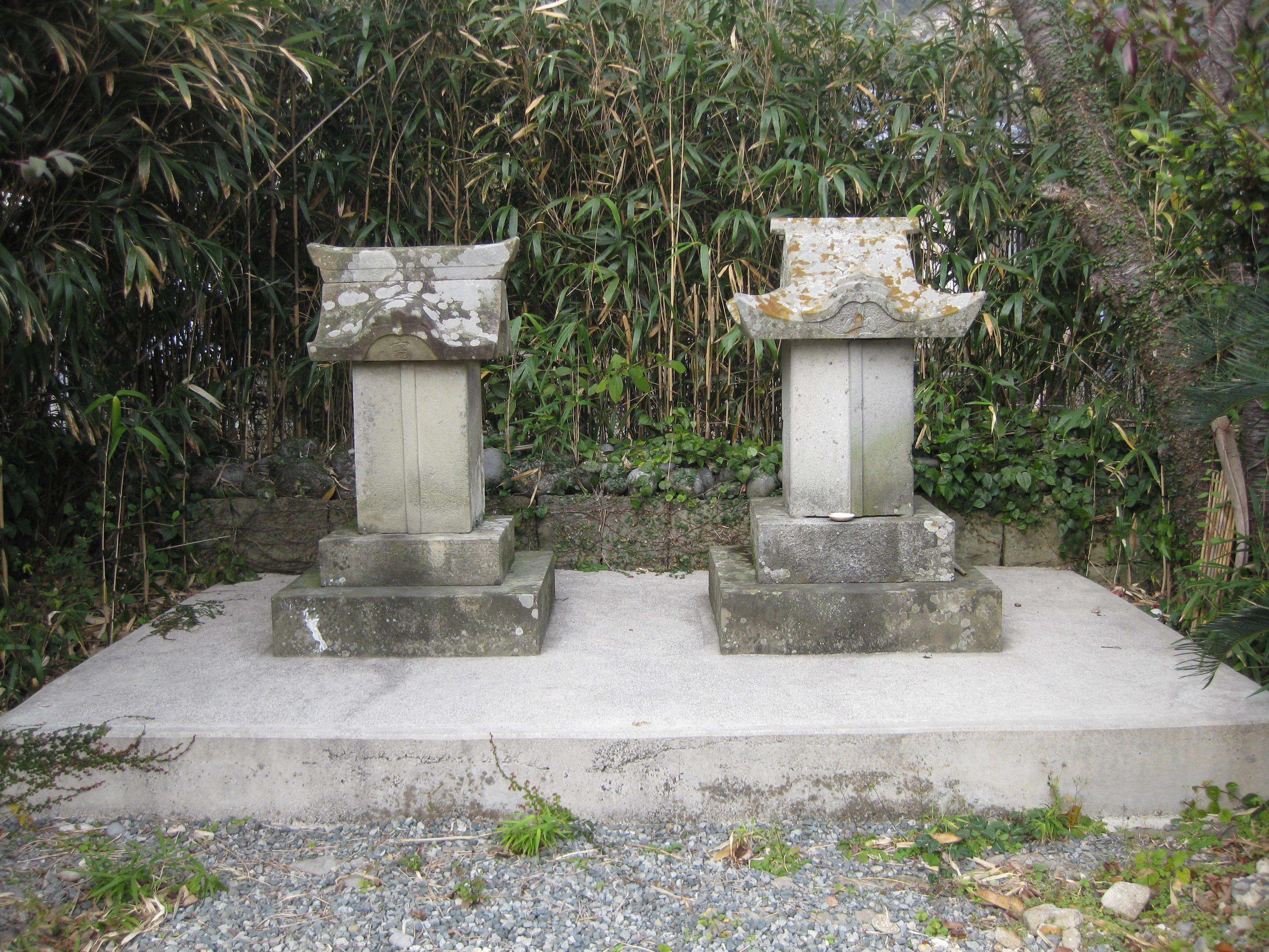 新上五島町荒川郷 雄嶽日枝神社